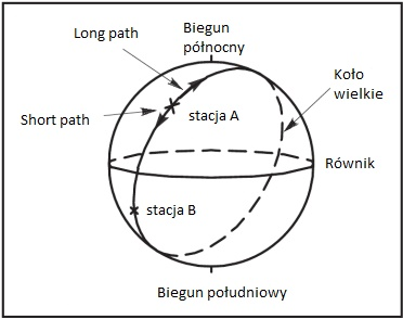 Wyjaśnienie sposobu prowadzenia łączności amatorskiej na pasmach krótkofalowych - long path